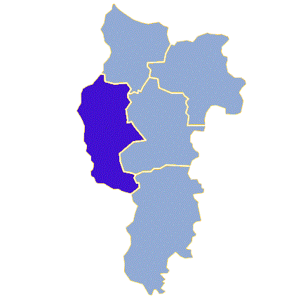 Powiat słubicki - Gmina Słubice